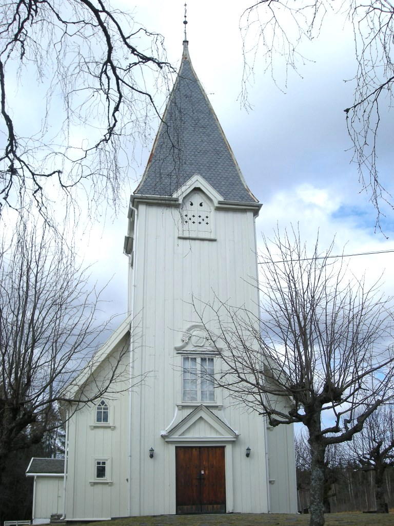 Mogreina kirke (Ullensaker kommune)